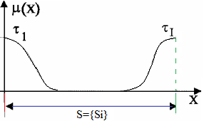 рисунок 3